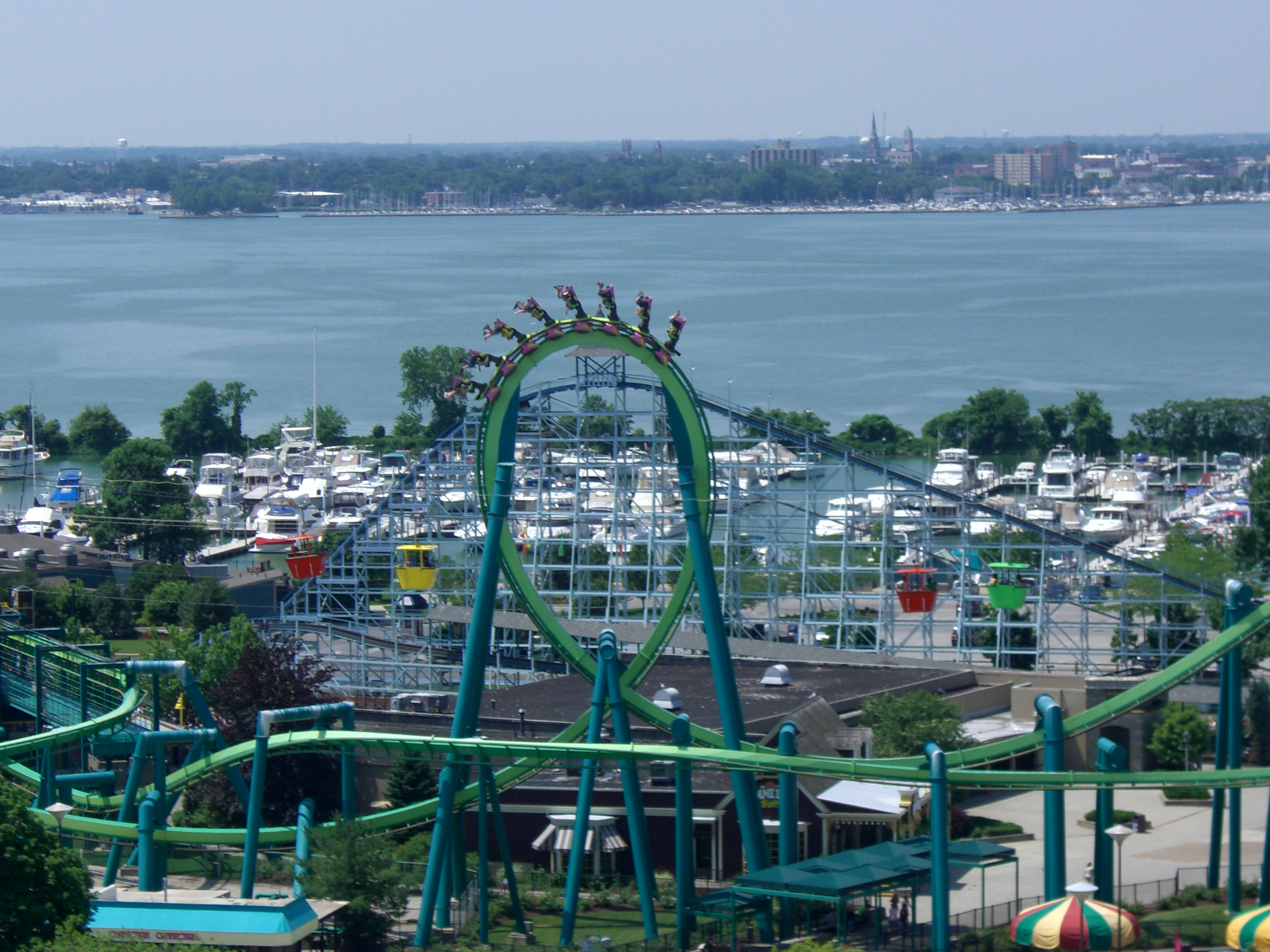 Raptor , montagnes russes à Cedar Point